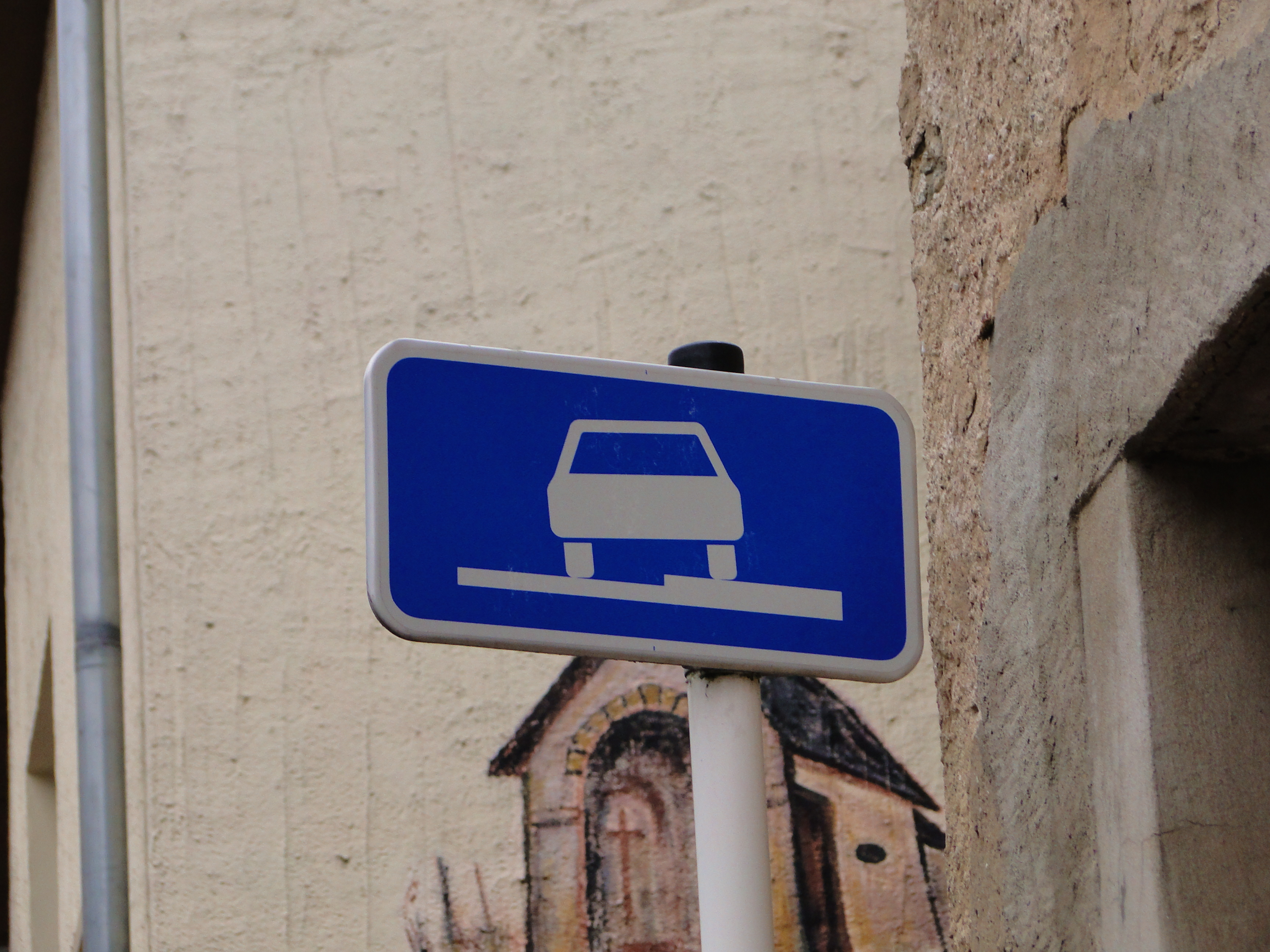 Verkéiersschëld F,15 aus dem lëtzebuerger Code de la Route: F,15 "Erlaabt fir deelweis um Trëttoir ze stationéieren".